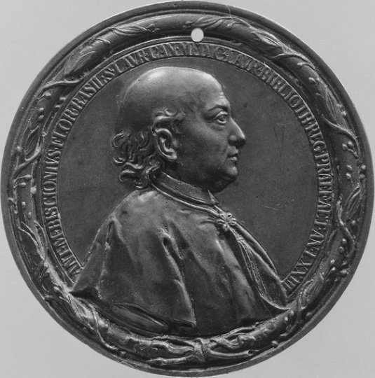 Antonio Maria Biscioni, medaglia, Metropolitan Museum, New York City